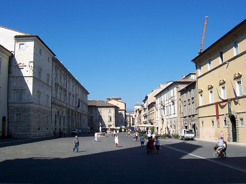 Ascoli Piceno - Piazza Arringo